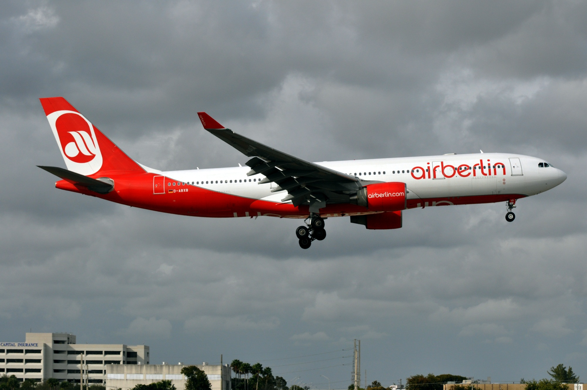 MSN 322 A330-223 AIR BERLIN MIA